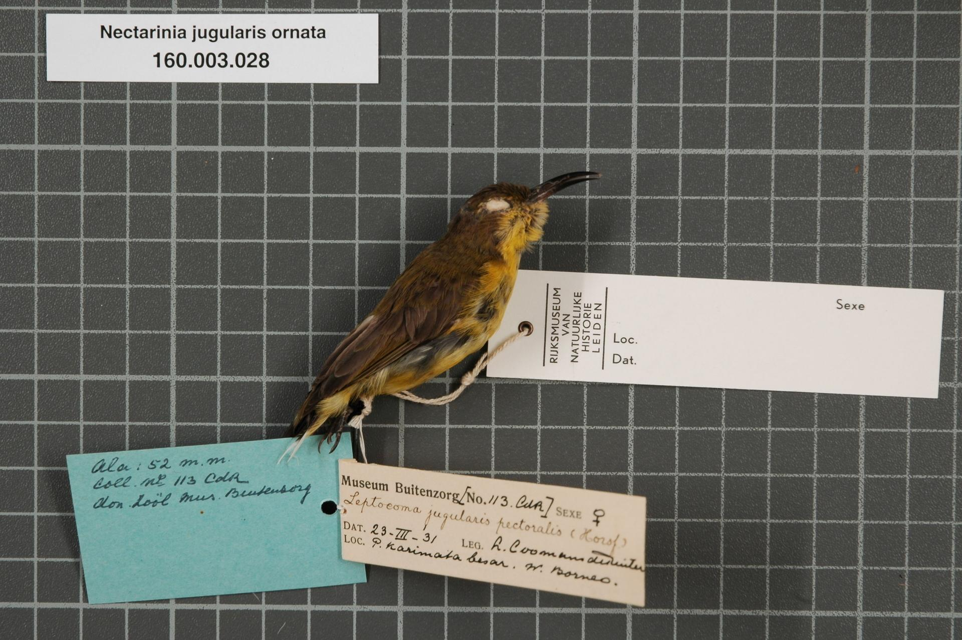 Nectarinia jugularis ornata (Lesson, 1822)